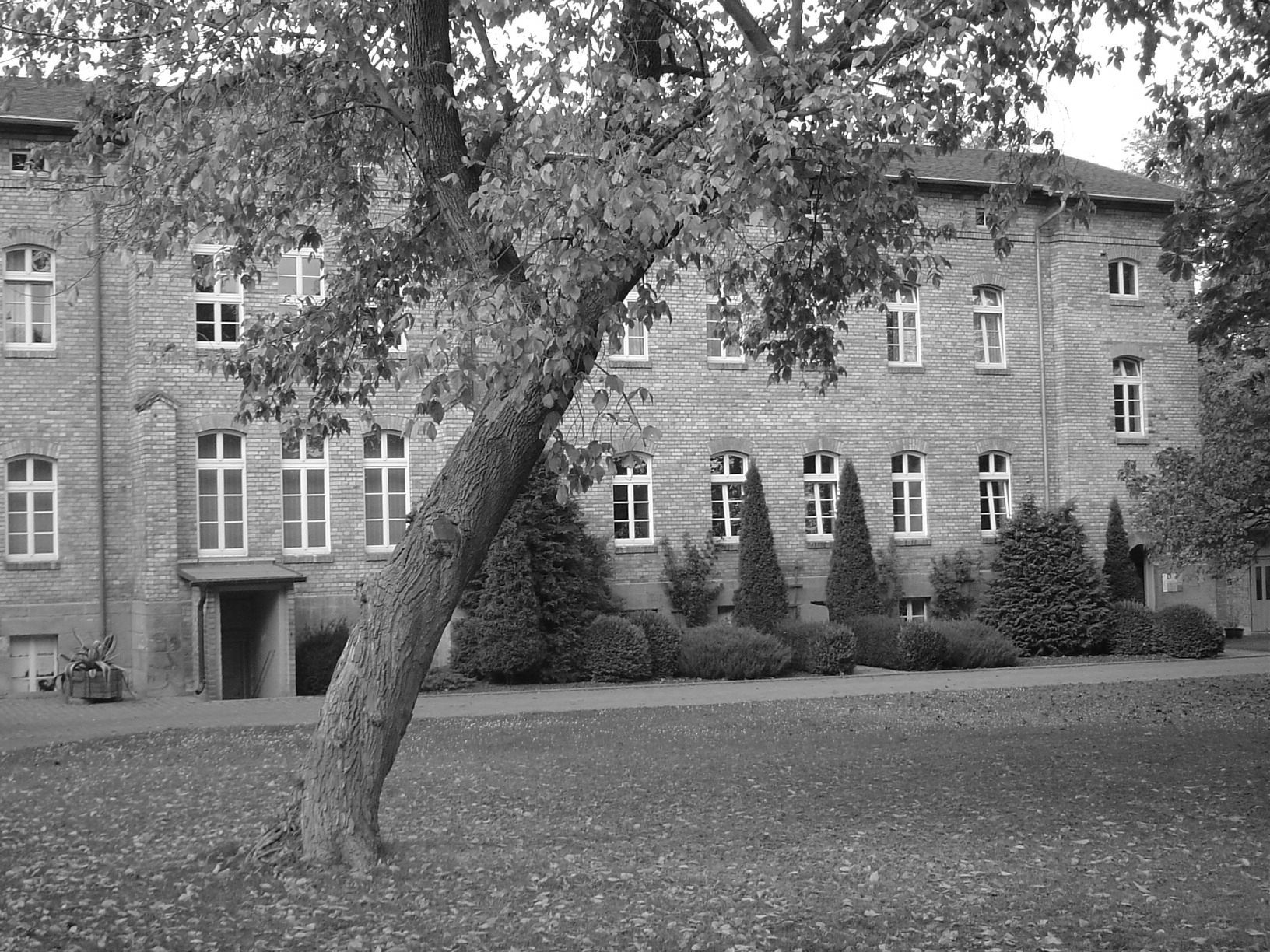 Das Tötungsgebäude der Anstalt in Bernburg